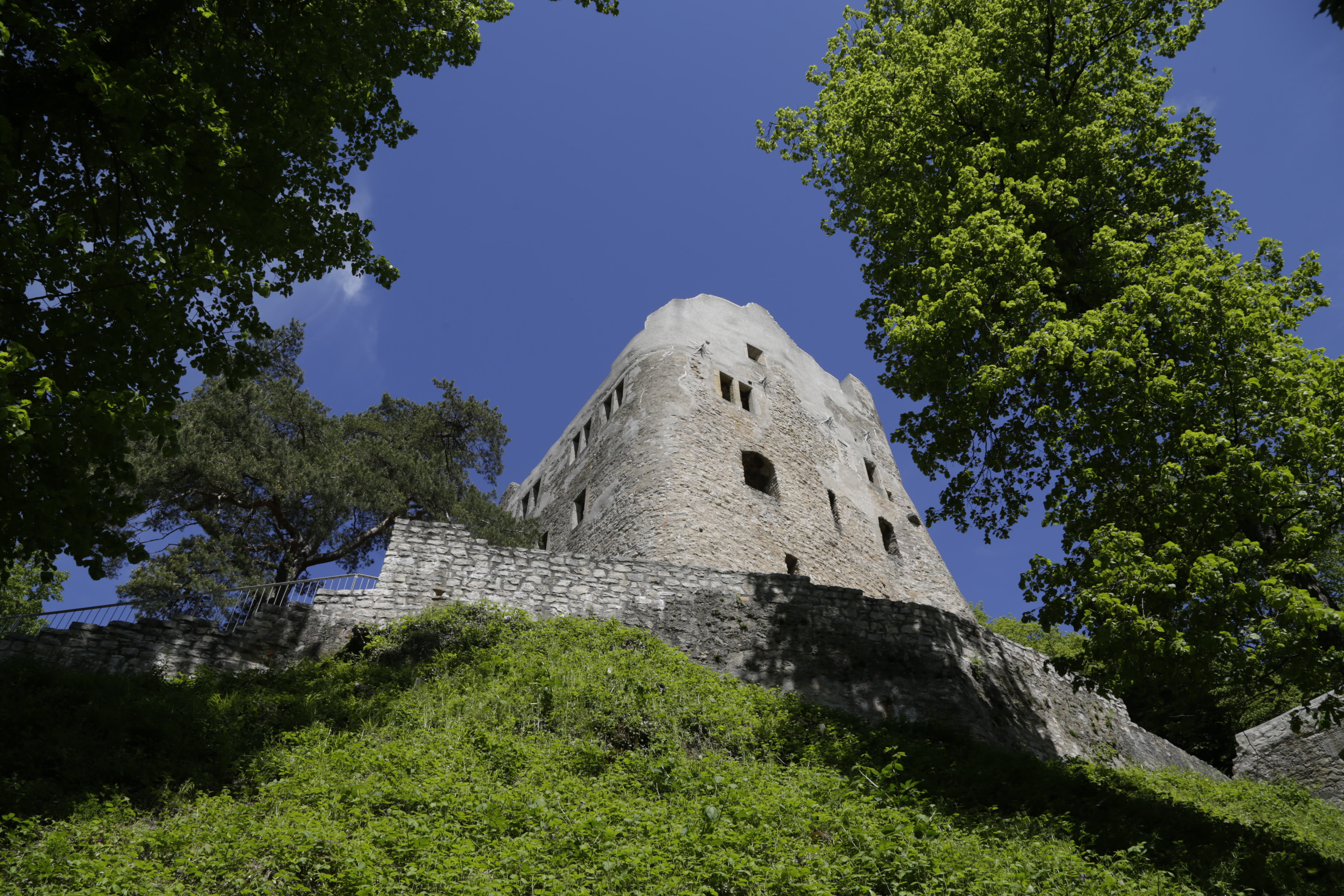 Die Burgruine Neu-Homburg